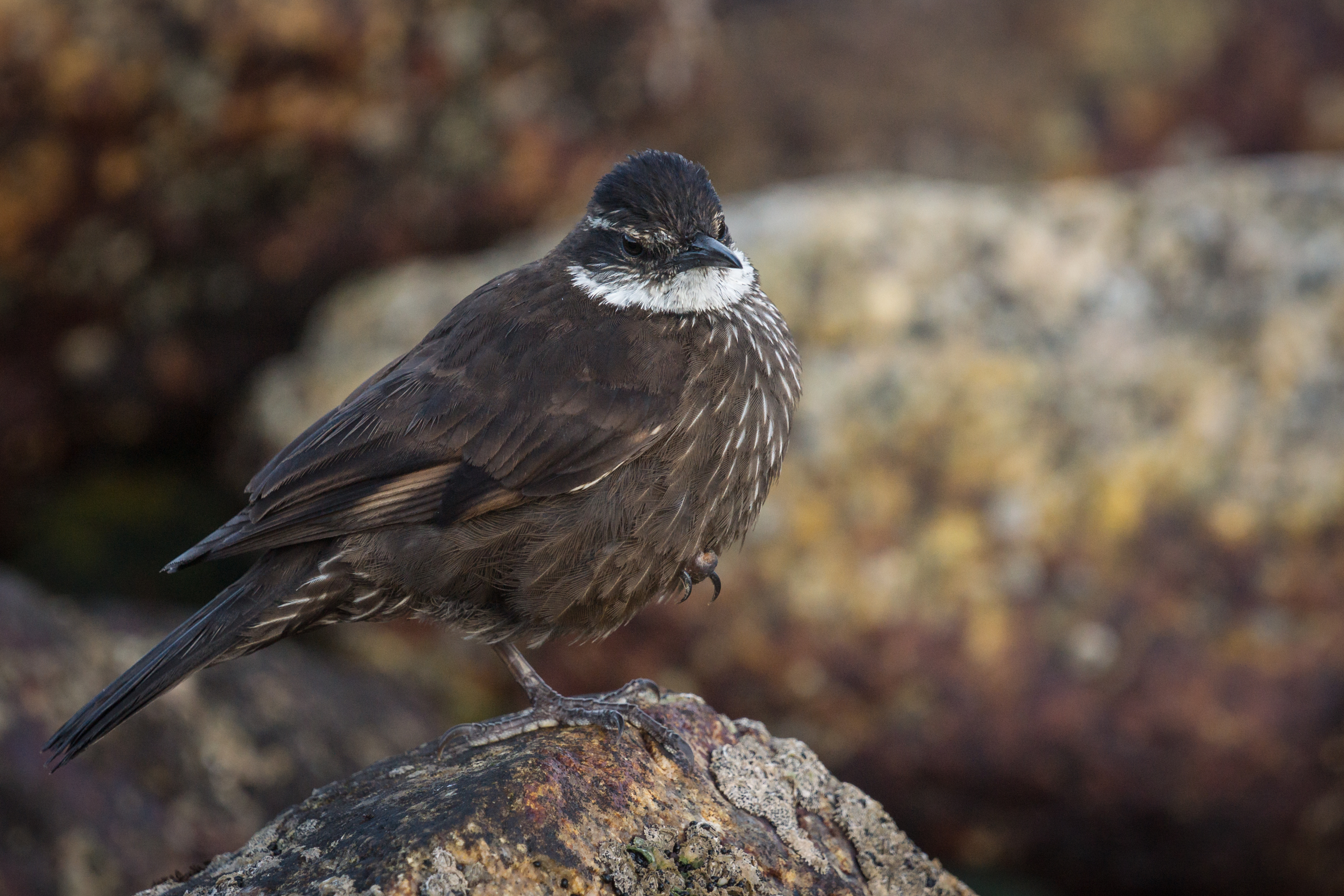 Churrete costero, costa de Algarrobo